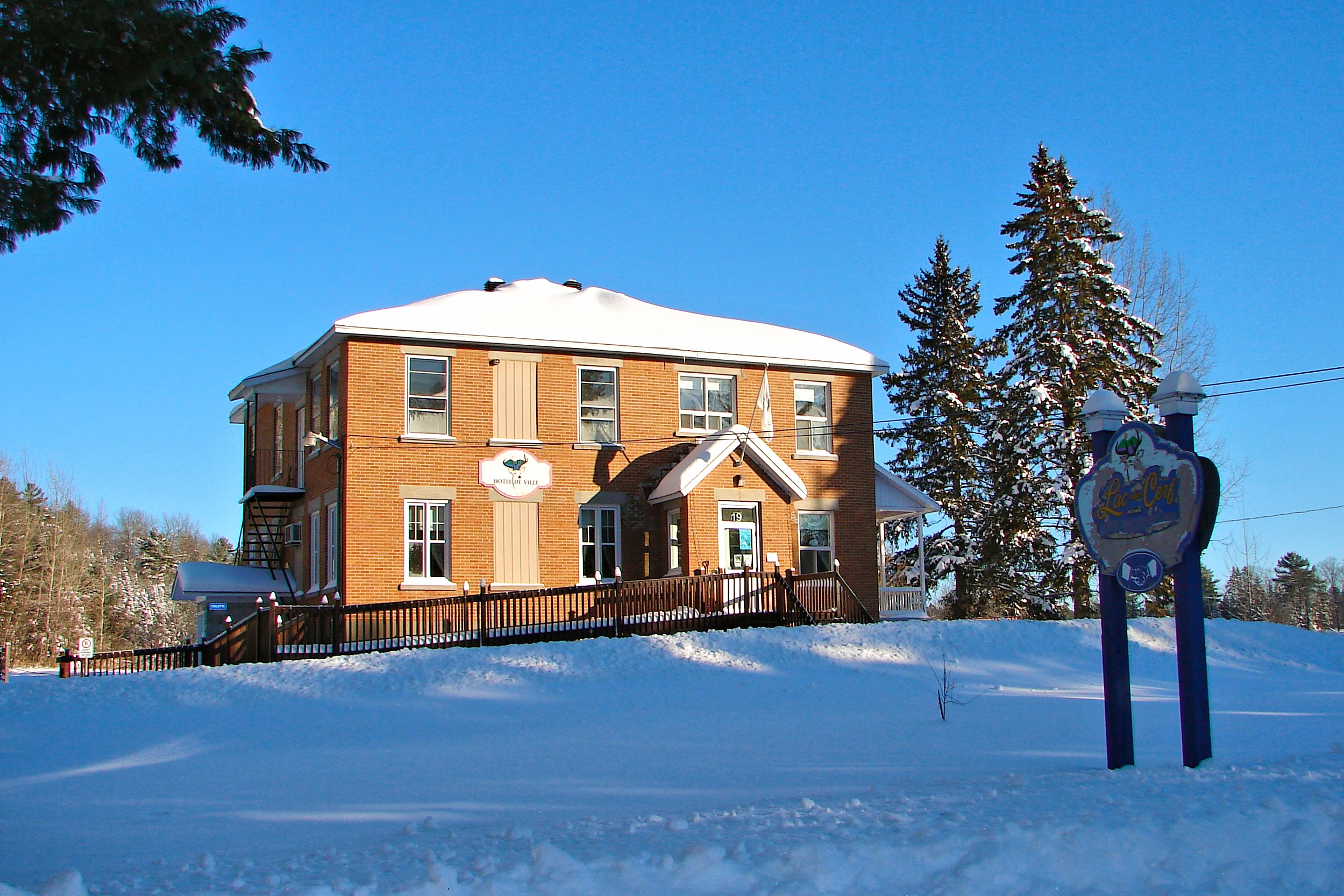 Lac-du-Cerf, Quebec, Canada